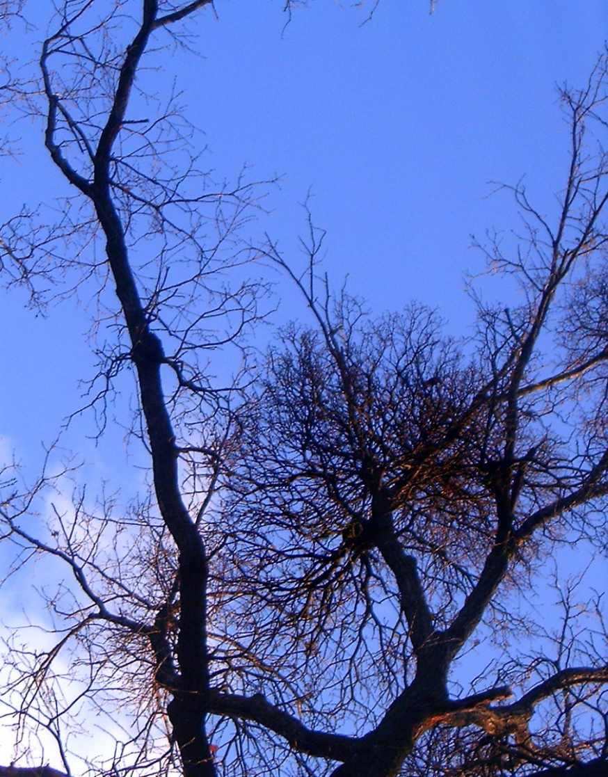 Česky: duby v PP Baba napadené ochmetem